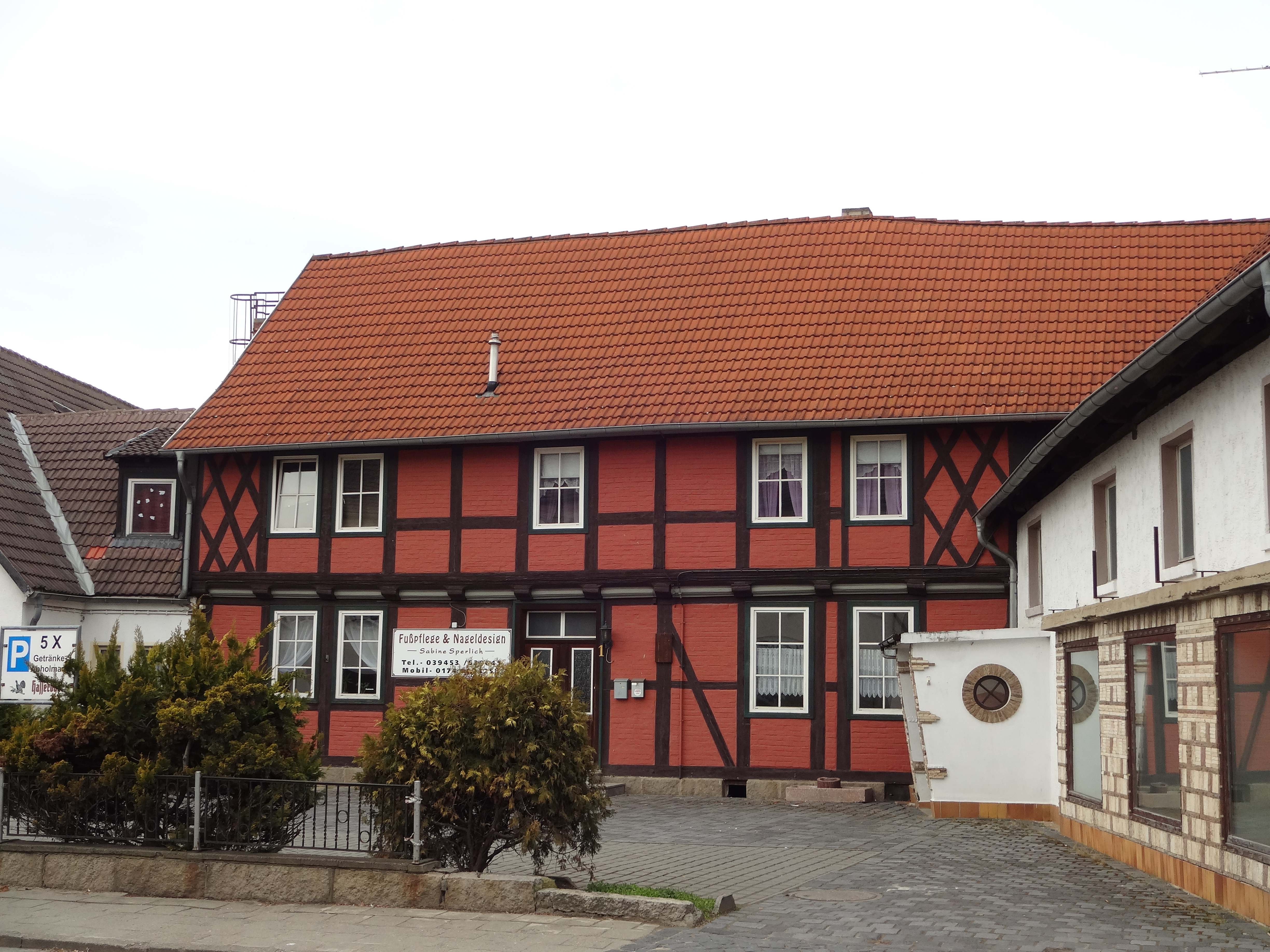 denkmalgeschütztes Wohnhaus in der Halberstädter Straße 1 in Derenburg, Ortsteil von Blankenburg (Harz)